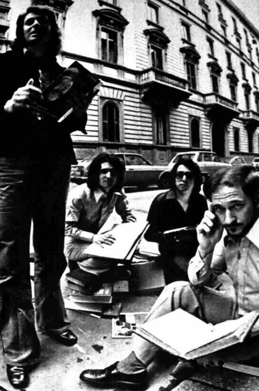 Italian band Homo Sapiens